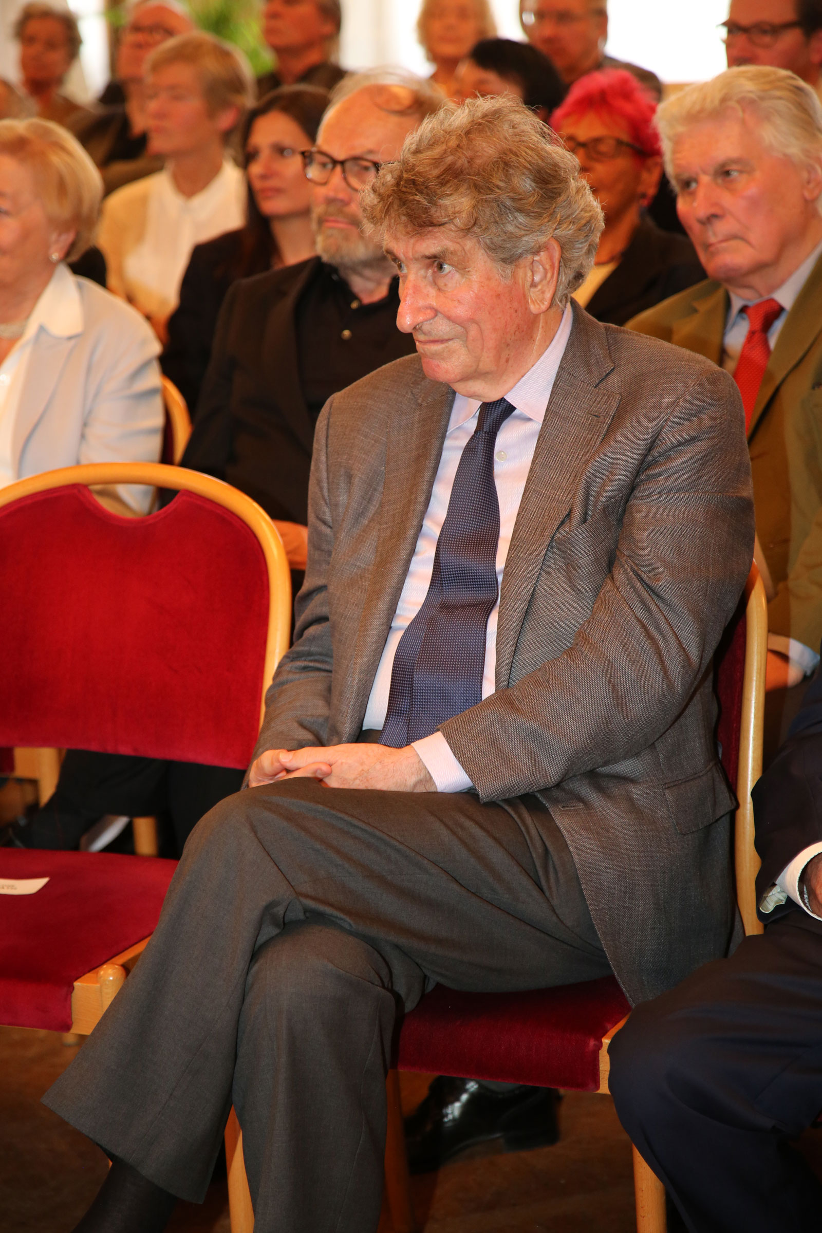 Günter Rhomberg, Kunstmanager und Kulturfunktionär